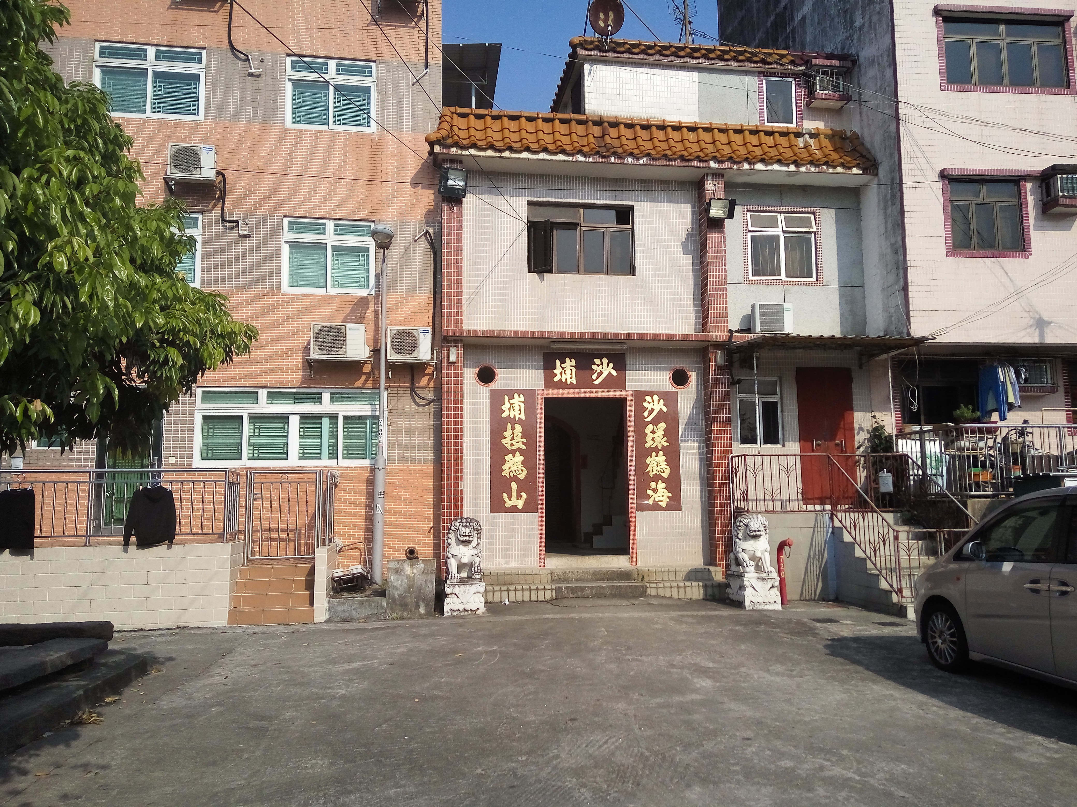 中文（香港）: 錦田沙浦村圍門